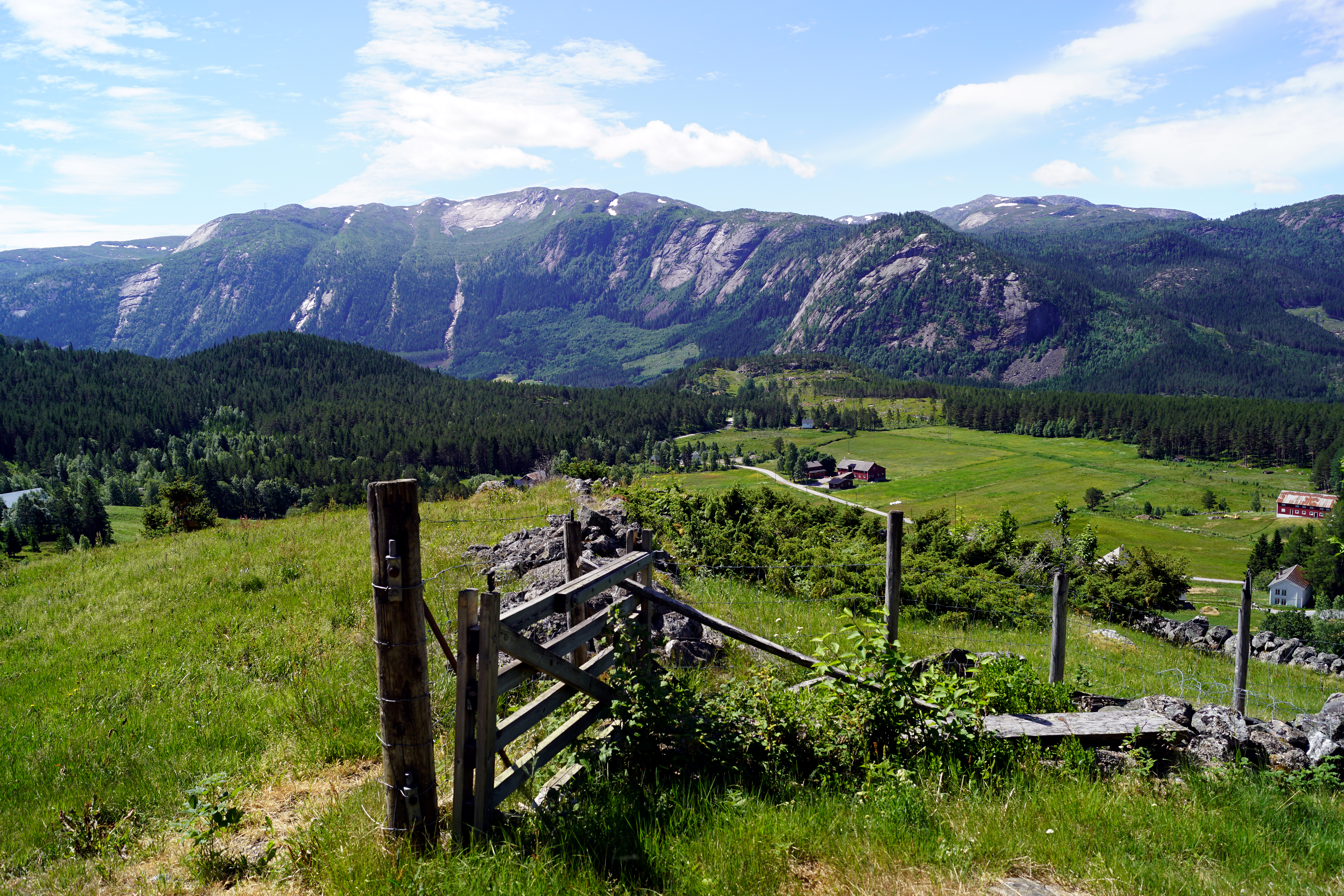 Setesdal ved Flateland nord for Valle, set fra Rygnestad